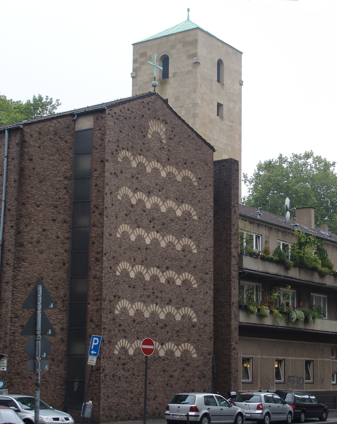 Lutherkirche Köln Rückansicht